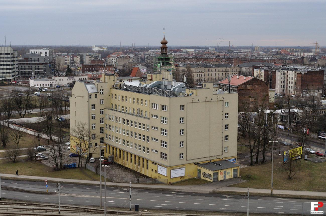 Gmach przychodni przy ulicy Dobrzyńskiej.